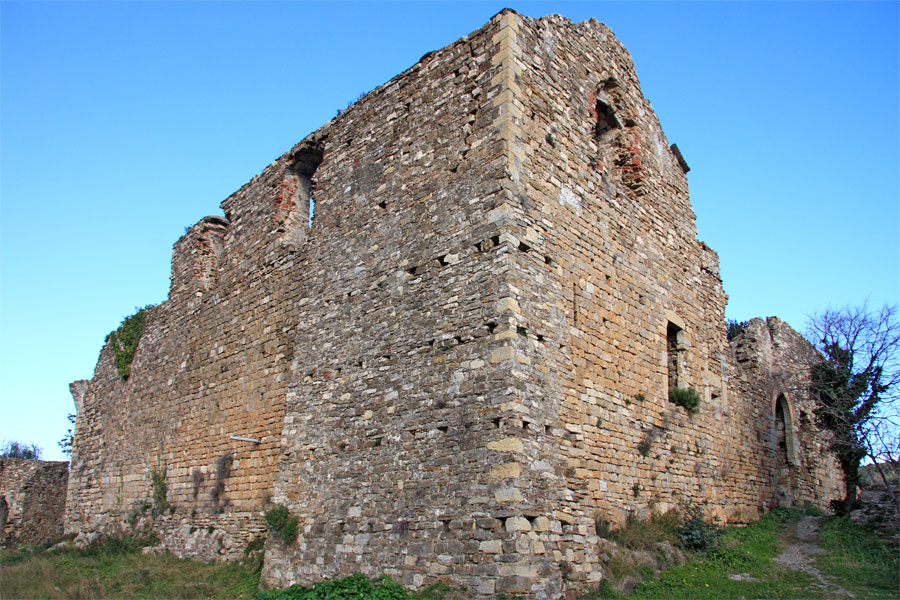 Ruderi del Castello di Andora